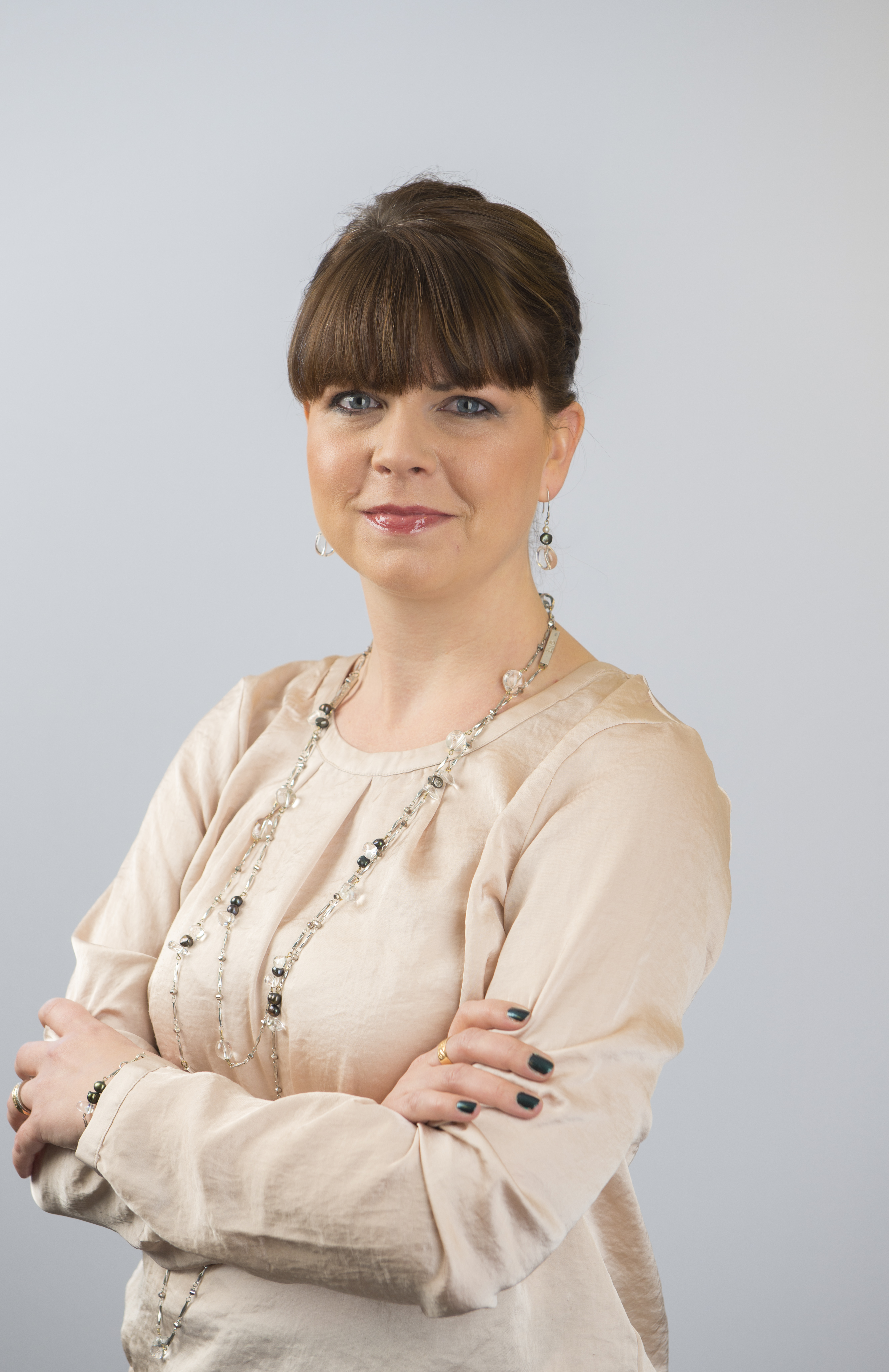 Bilden är fri att använda. Uppge fotograf Patrick Trägårdh